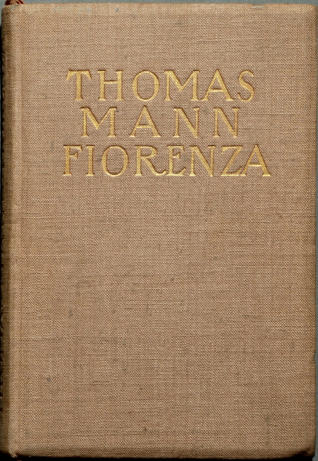 Thomas Mann: Fiorenza. Berlin: S. Fischer 1906, 170 Seiten Erste Auflage (Potempa E 20.2, Bürgin I 4, Wilpert/Gühring² 6) Orig.- Leinen 18,5 x 12,5 cm. Kopfgoldschnitt; Vorder-, Hinterdeckel und Rücken mit Goldprägedruck.